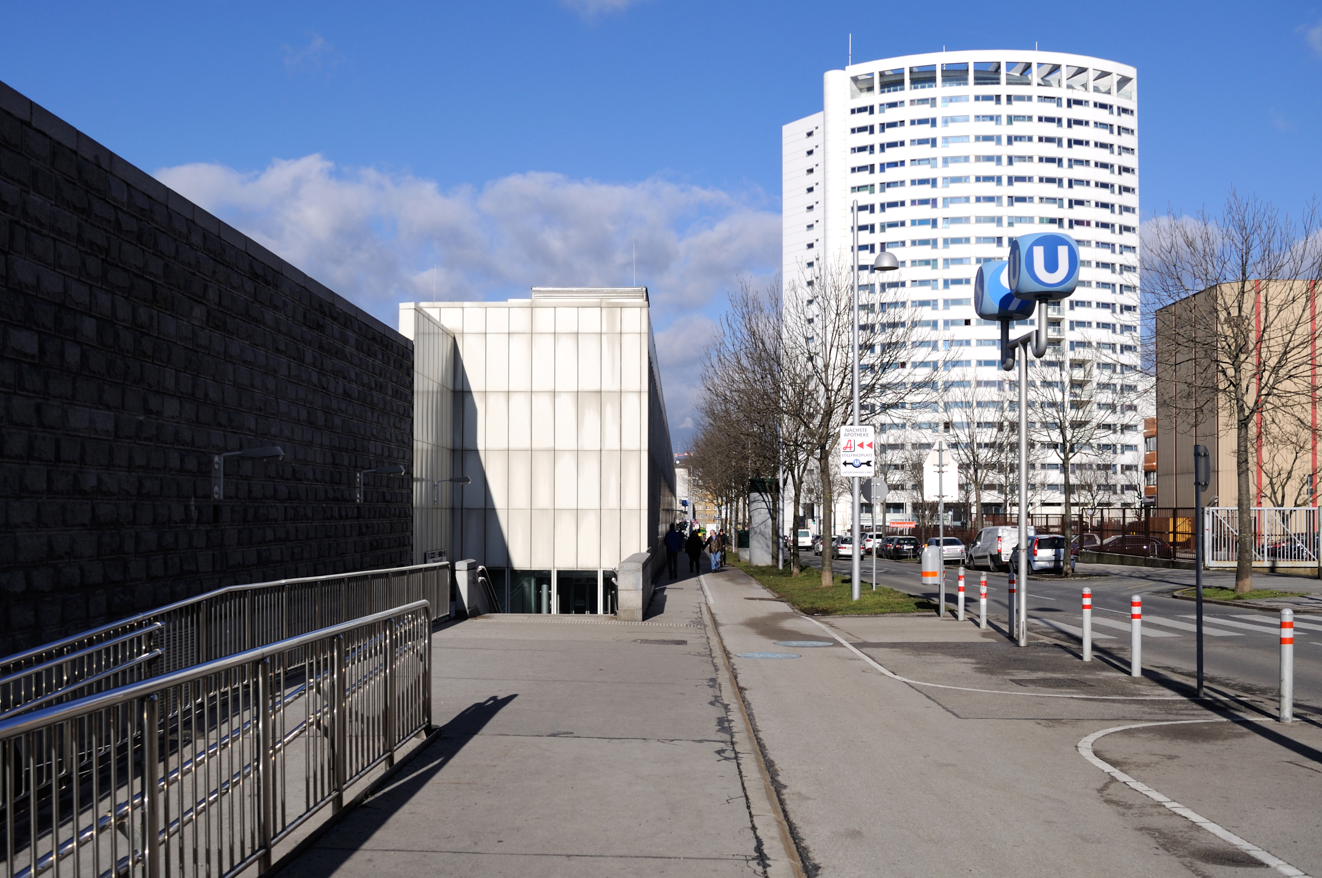 Zugang zur U3-Station Ottakring in der Huttengasse.